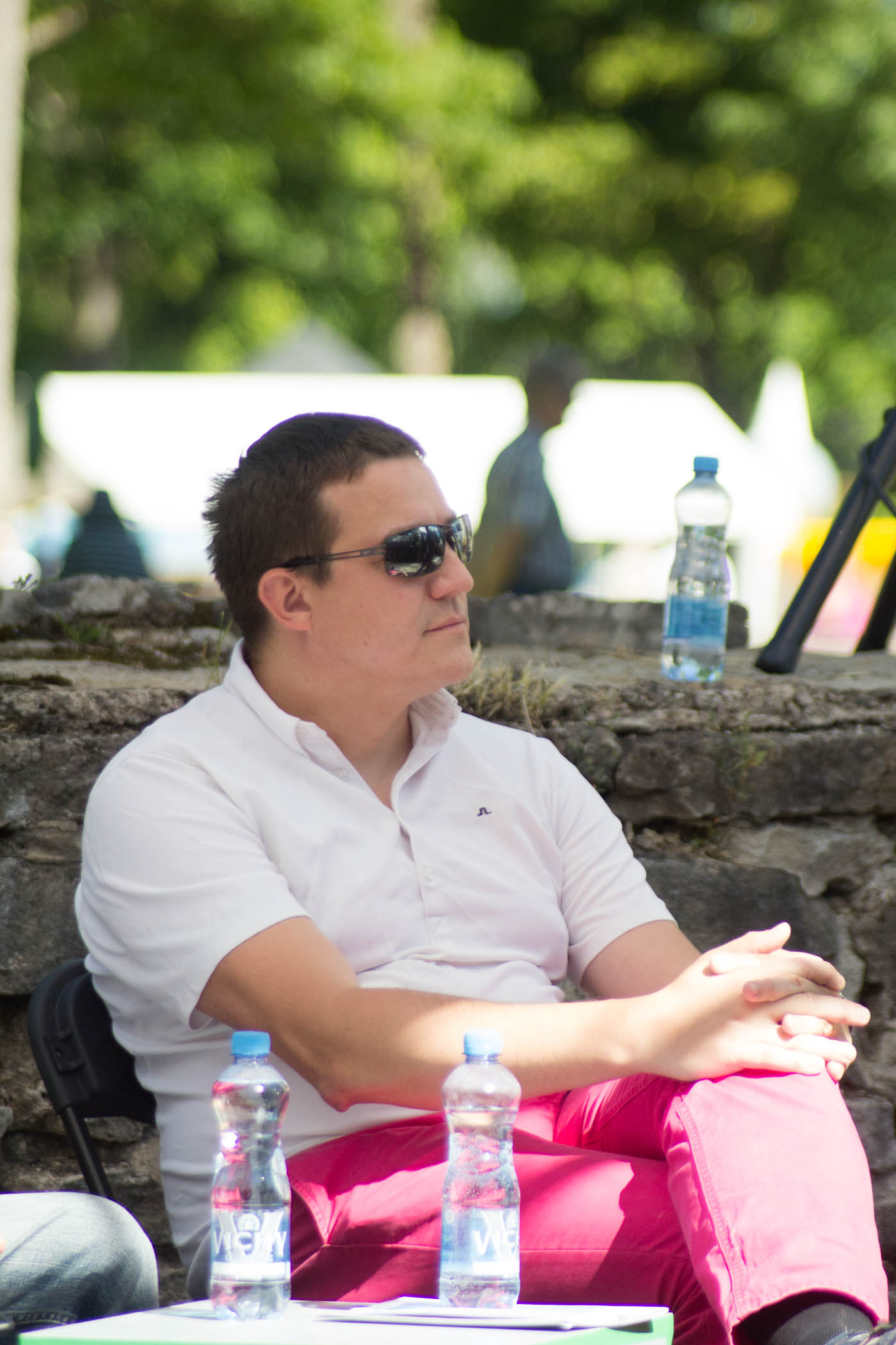 Sten Tamkivi arutlemas teemal "Mis kasu on Eestile start-up'idest?"